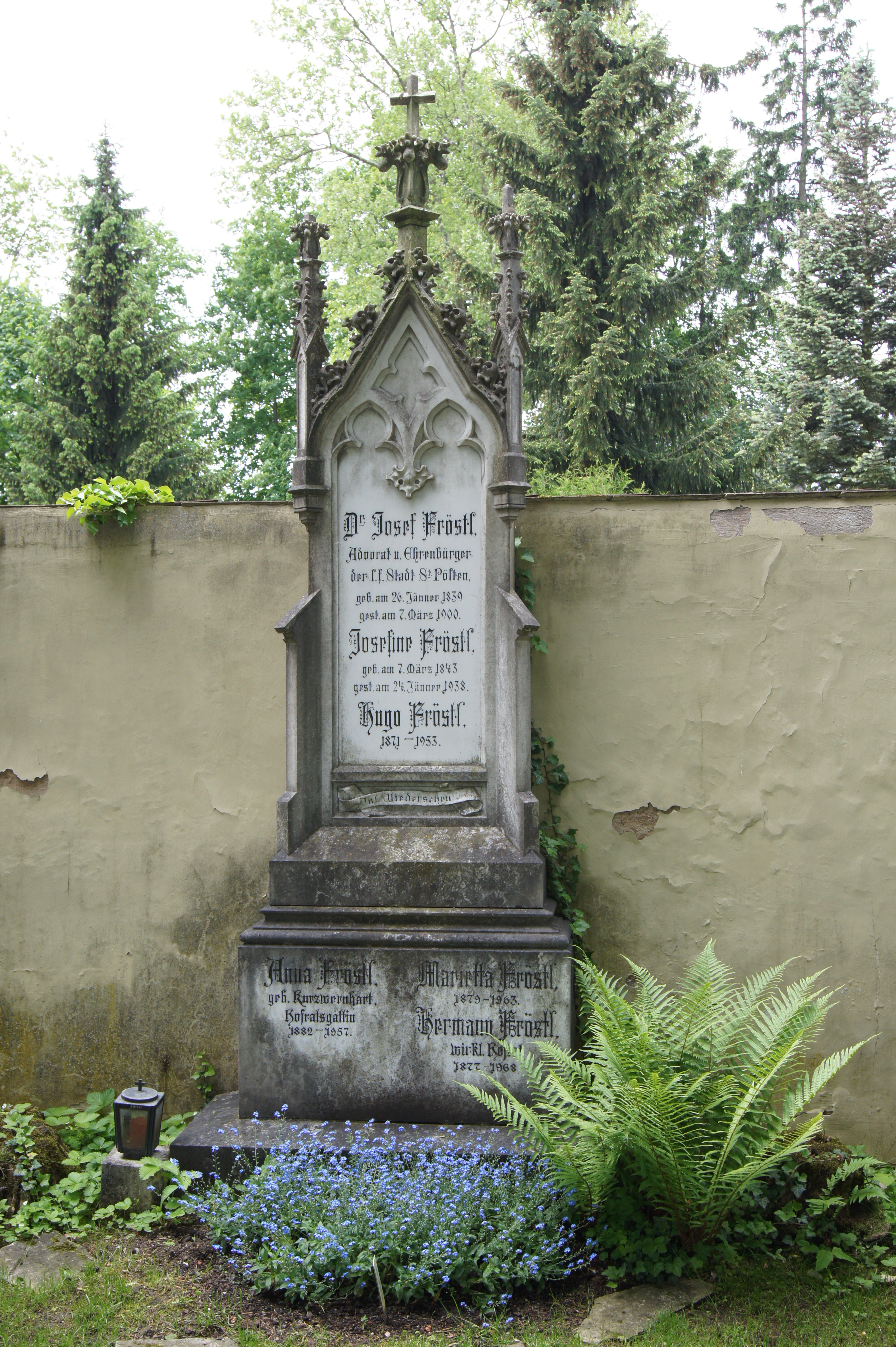 Städtischer Hauptfriedhof, Fröstlgrab